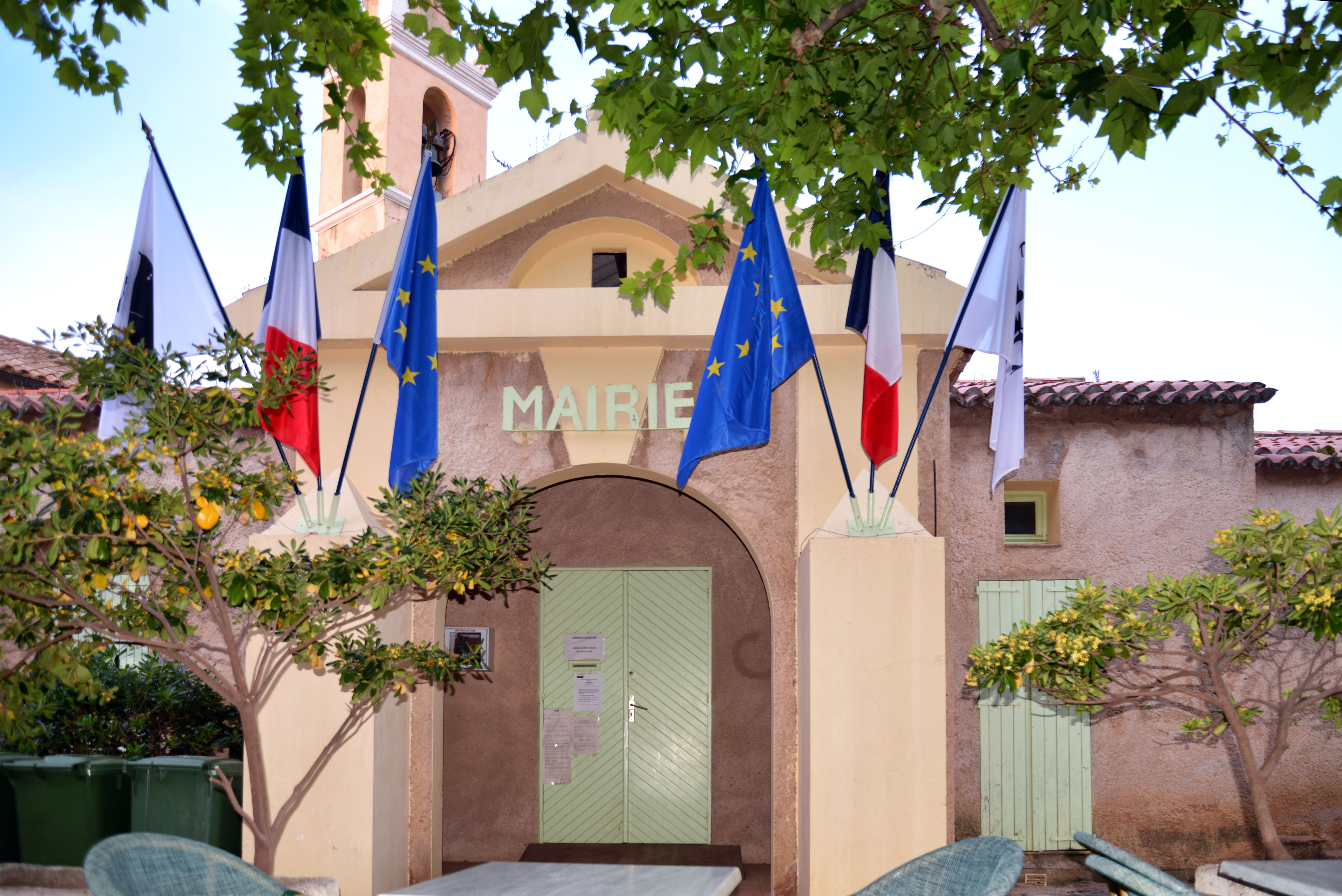 Algajola, Balagne (Haute-Corse) - La mairie